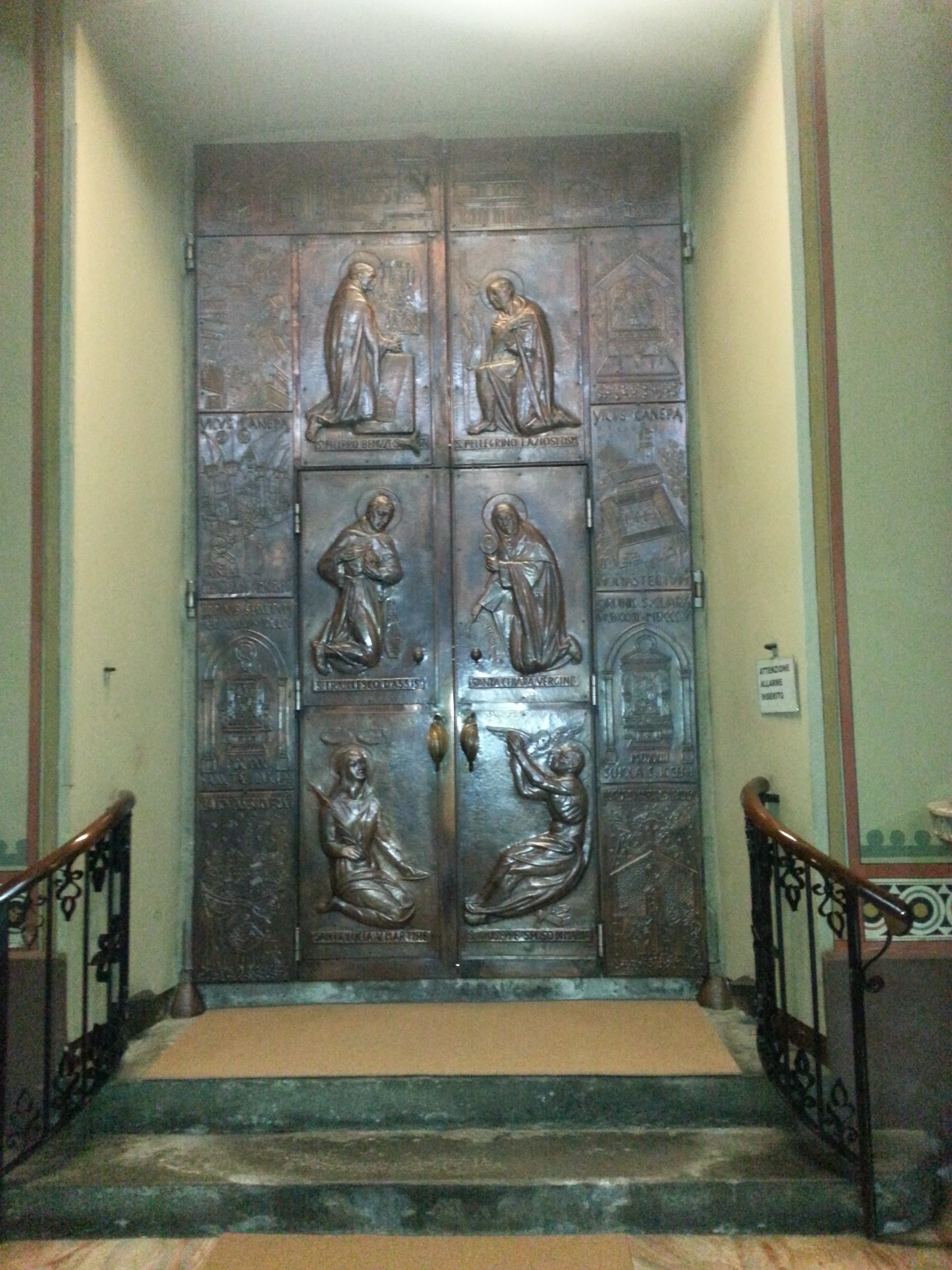 Porta laterale - Claudio nani -Chiesa del Paradiso